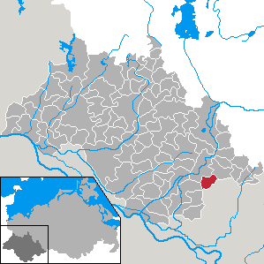 Kremmin in Mecklenburg-Vorpommern - district Ludwigslust